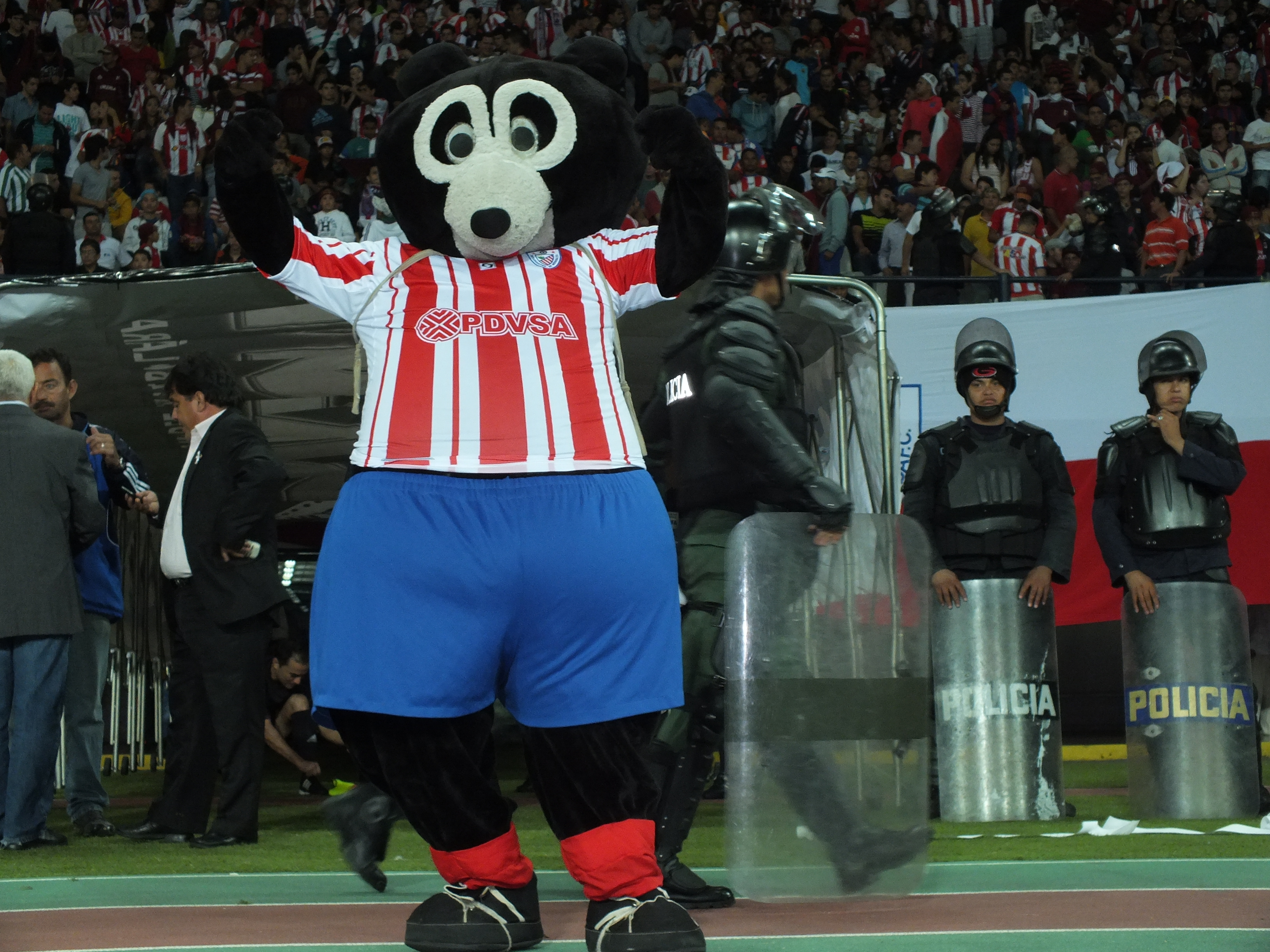 "Coco", la mascota oficial de Estudiantes de Mérida F.C.